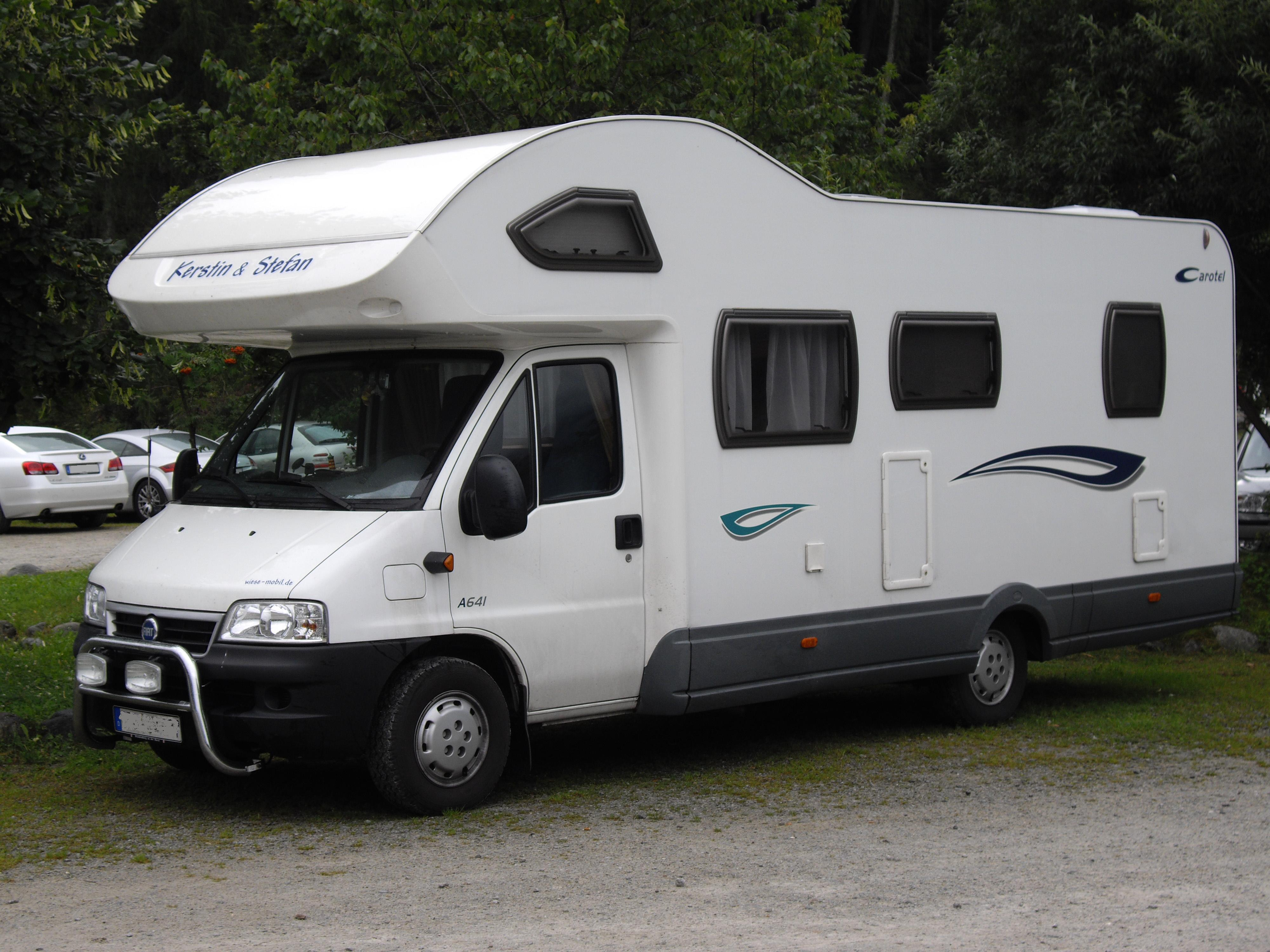 Alkovenwohnmobil Cristall A641 auf Basis eines Fiat Ducato